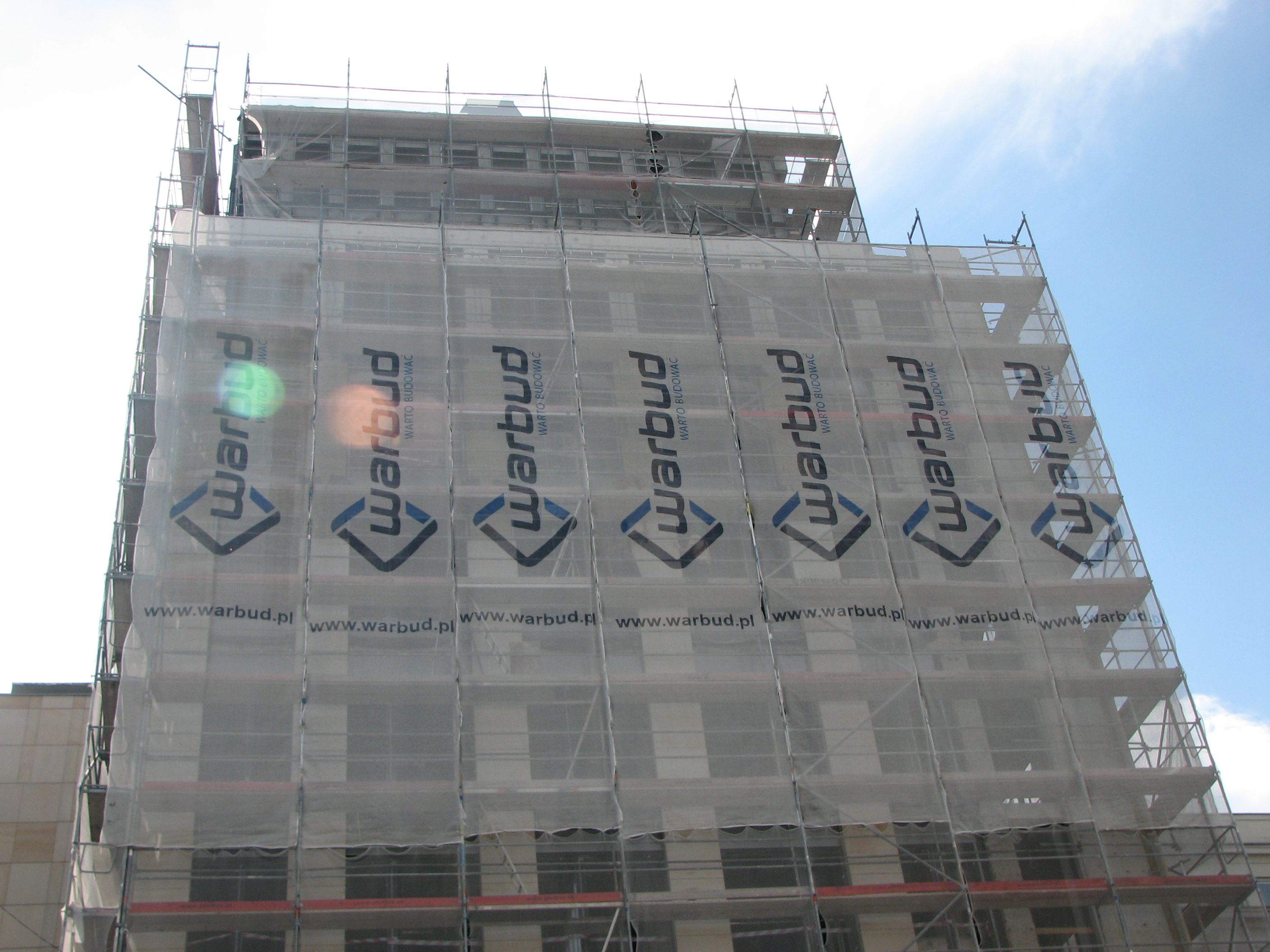 Warbud